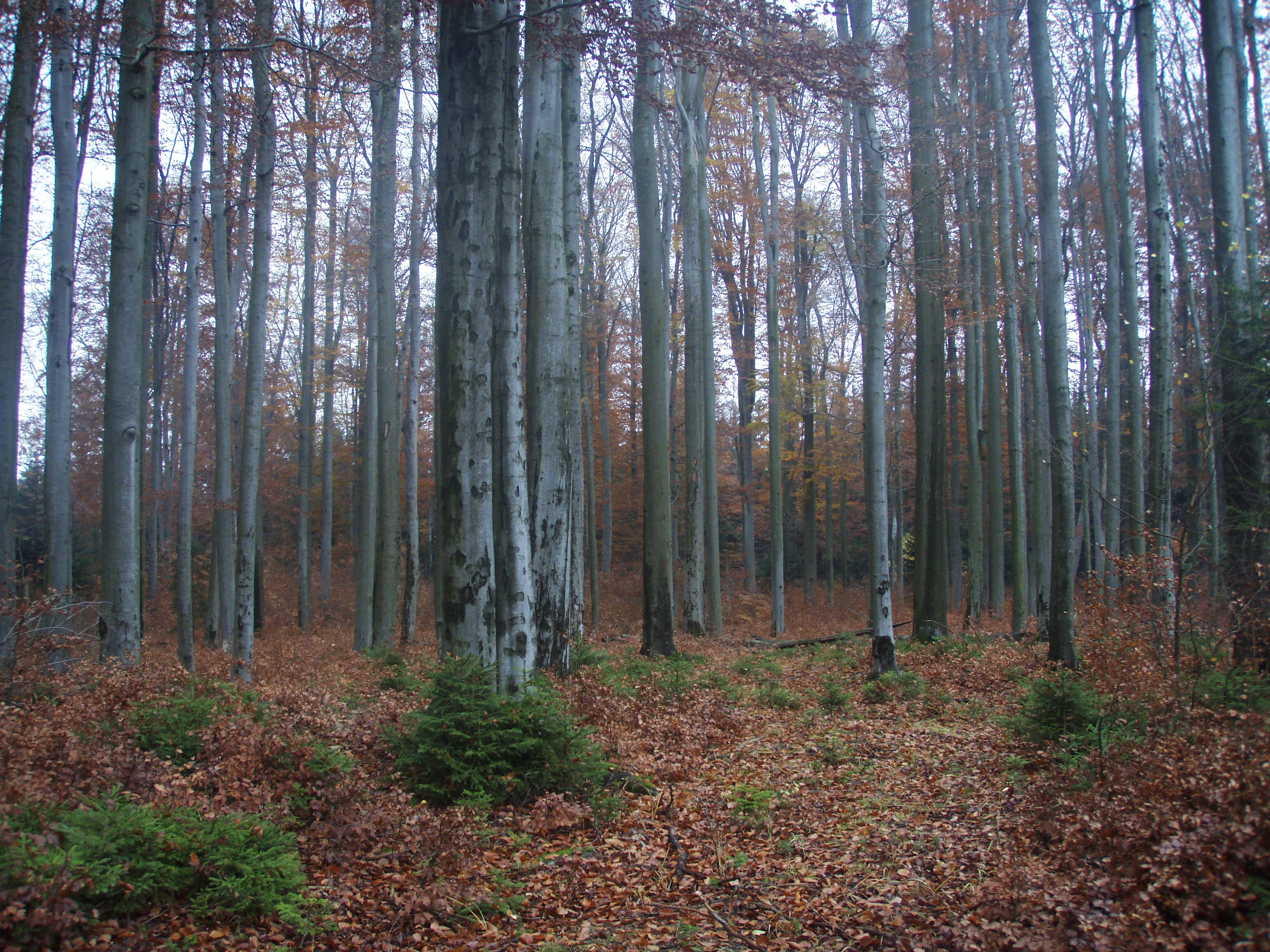 Natural Monument V bukách, near Polička Town